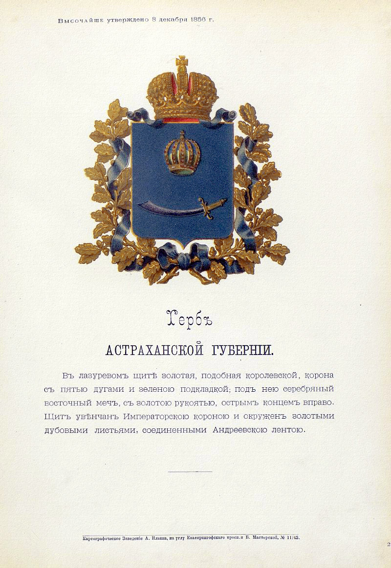 Official Russian Empire coat of arms Astrakhan Governorate. Герб Российской Империи Астраханской губернии с официальным описанием в Гербовнике Министерства внутренних дел Российской Империи 1880 года. Утверждён Императором Всероссийским Александром Вторым в 1856 году.